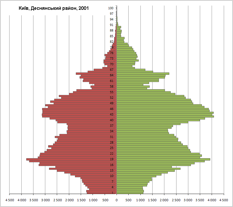 Статево-вікова піраміда населення Деснянського району Києва за переписом 2001 р.